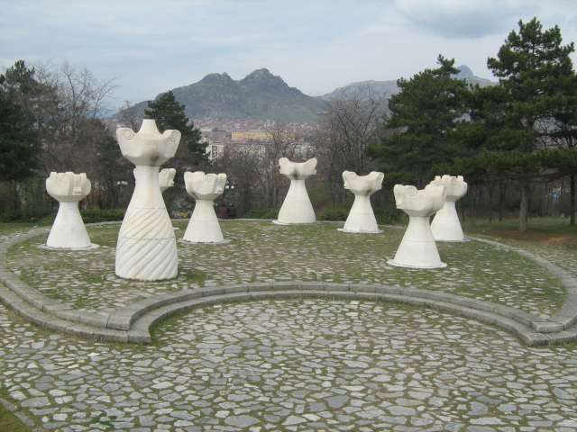 Могила на непобедените